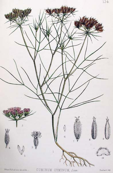 Cumin Cuminum cyminum